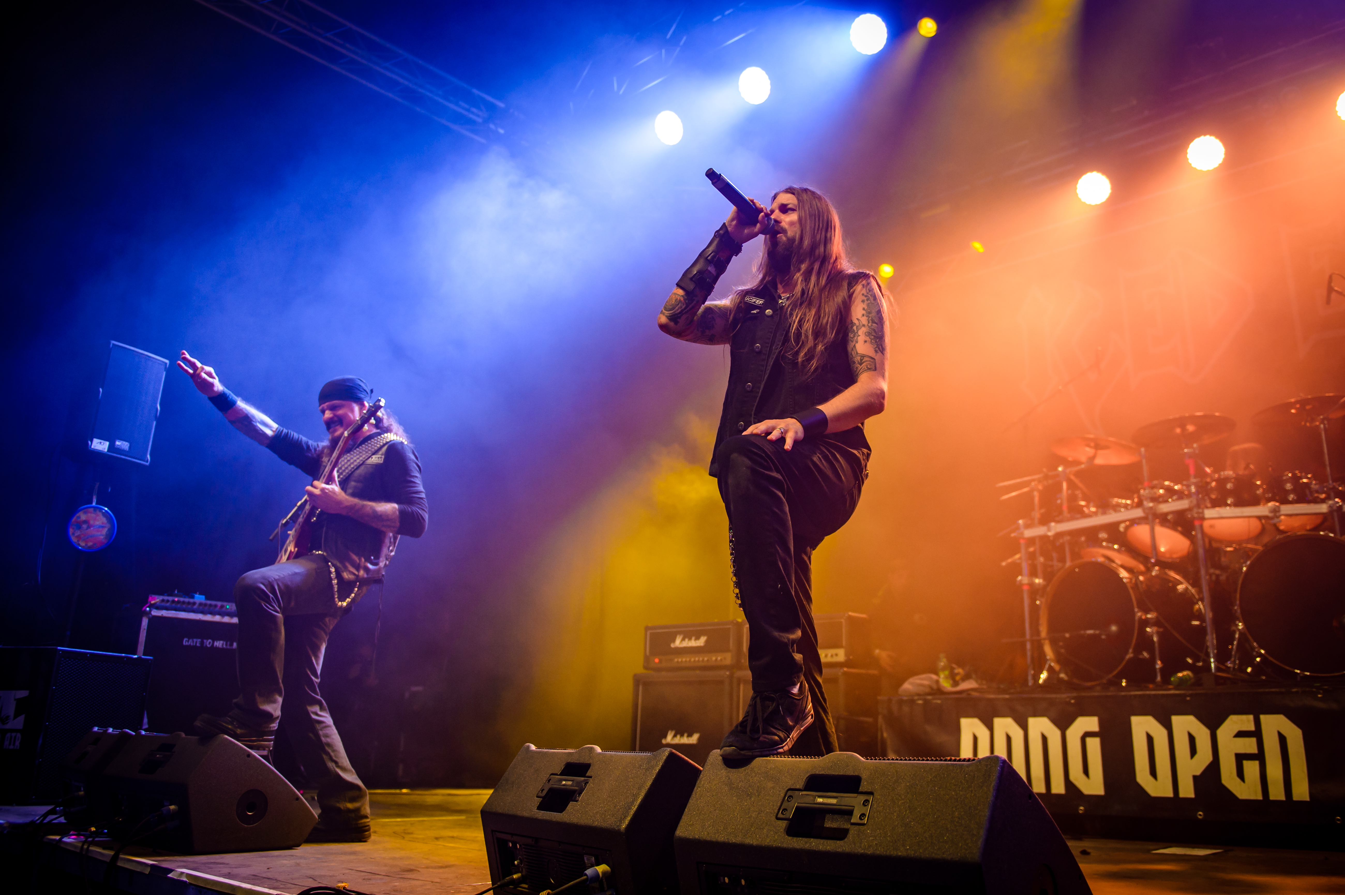 'Dong Open Air 2017; Neukirchen-Vluyn': 'Iced Earth'